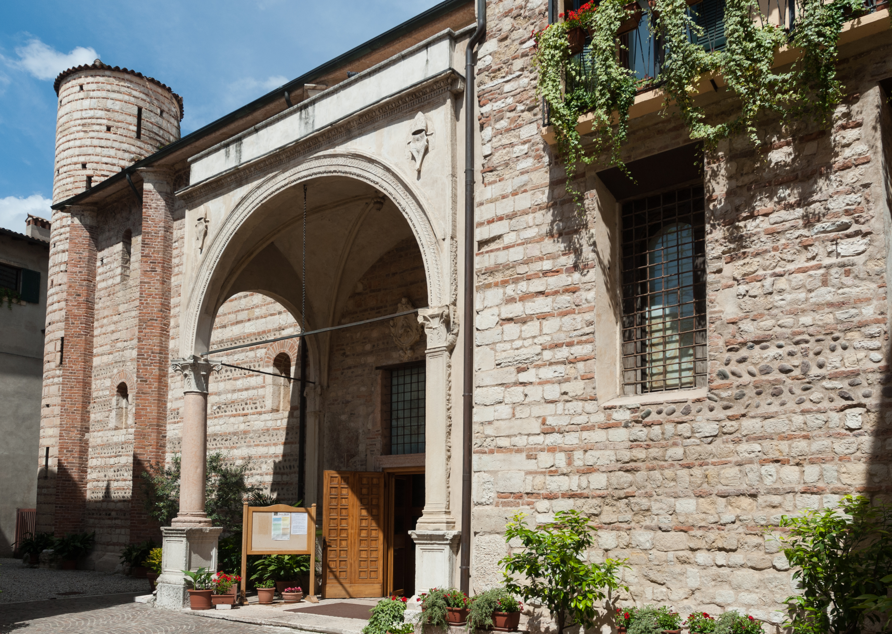 San Lorenzo a Verona (Regione del Veneto), ingresso